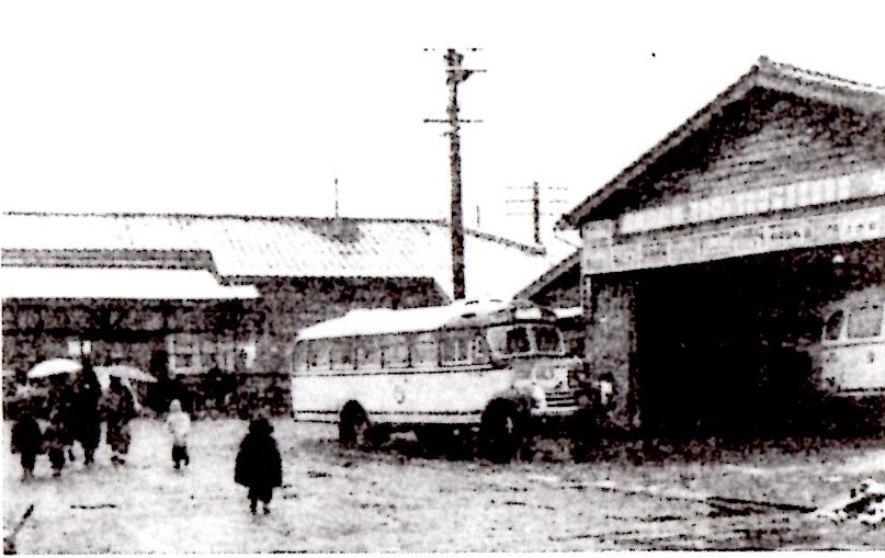 昭和20年代に撮影された福光駅